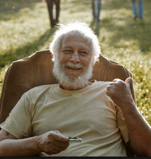 יעקב (יענקל'ה) רוֹטְבְּלִיט הוא פזמונאי, זמר, מלחין ועיתונאי ישראלי.